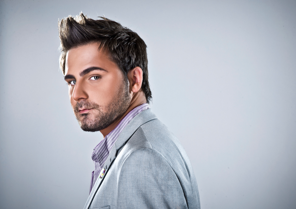 ישי רזיאל